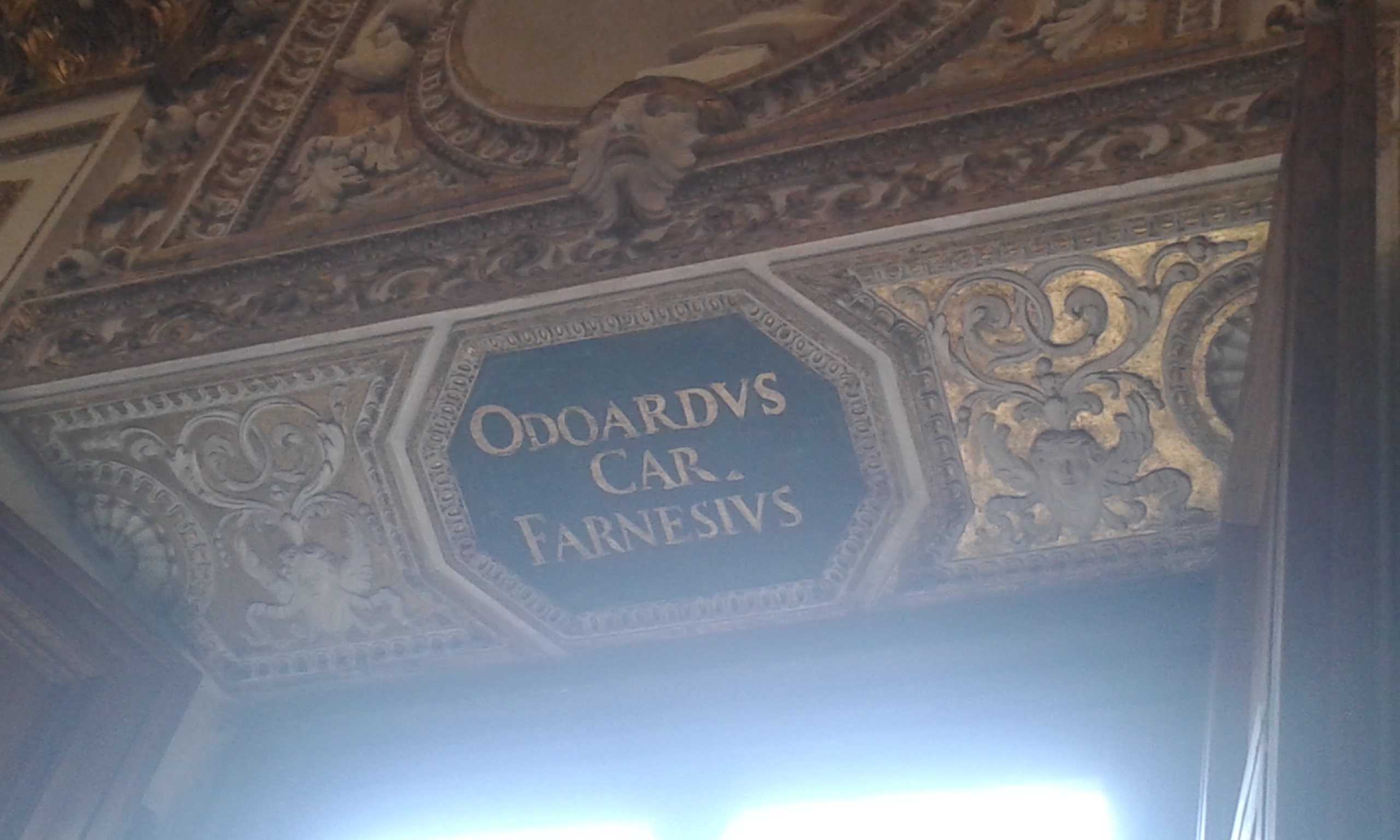 Farnese Gallery detail